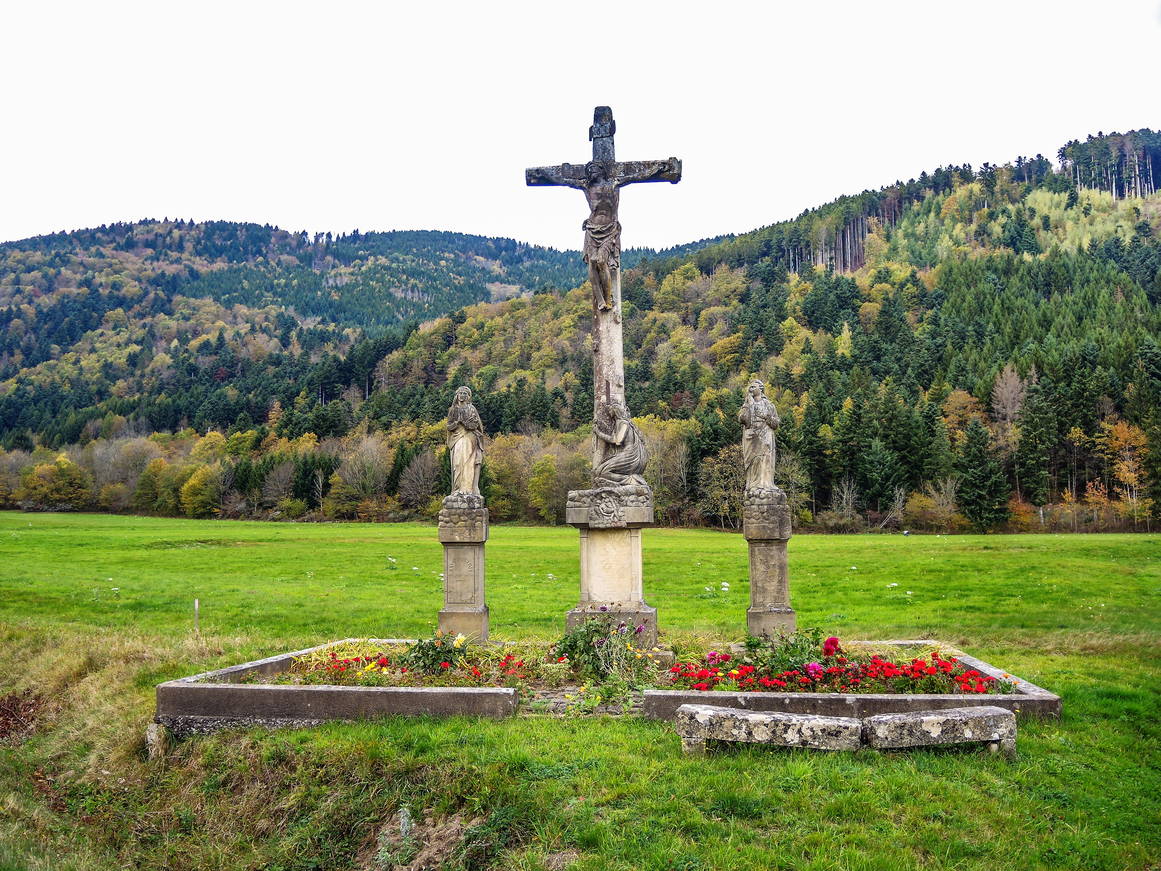 Calvaire à la sortie ouest du village de Dolleren. Haut-Rhin.